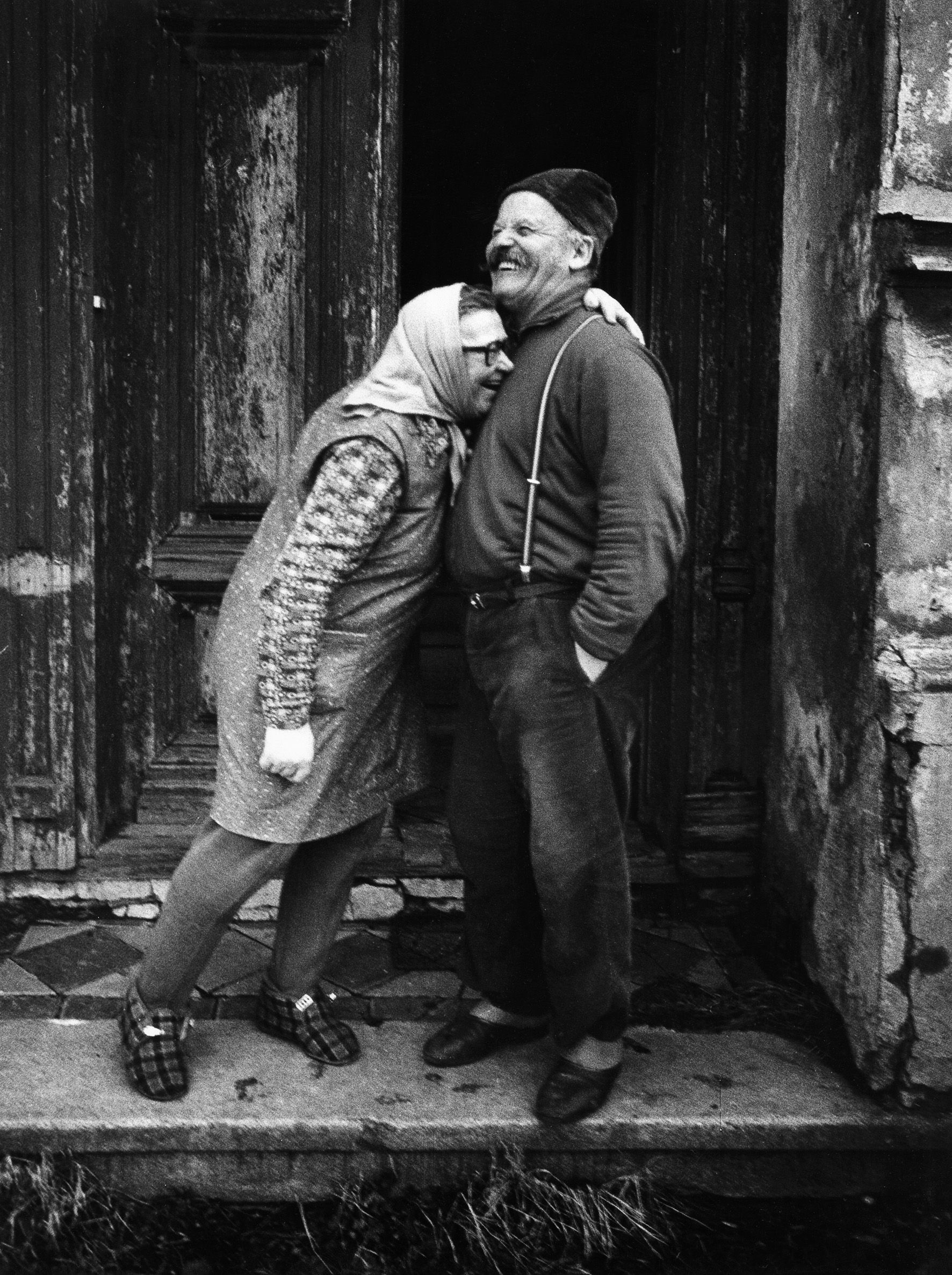 Jindřich Štreit´s archive